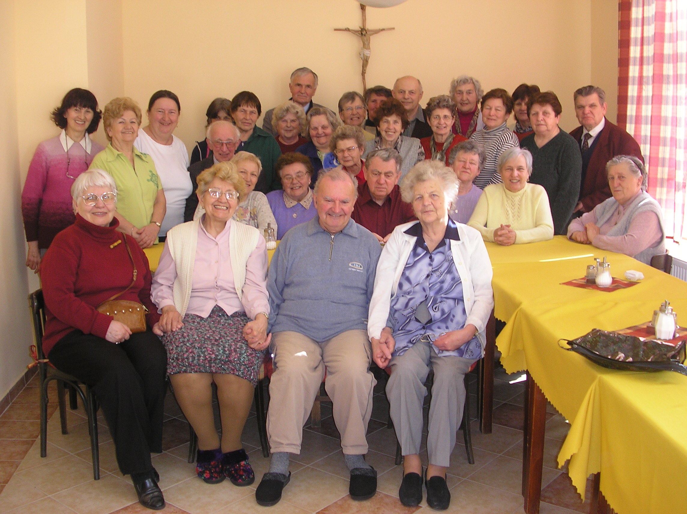 Duchovní obnova s P. Janem Rybářem SJ pro seniory